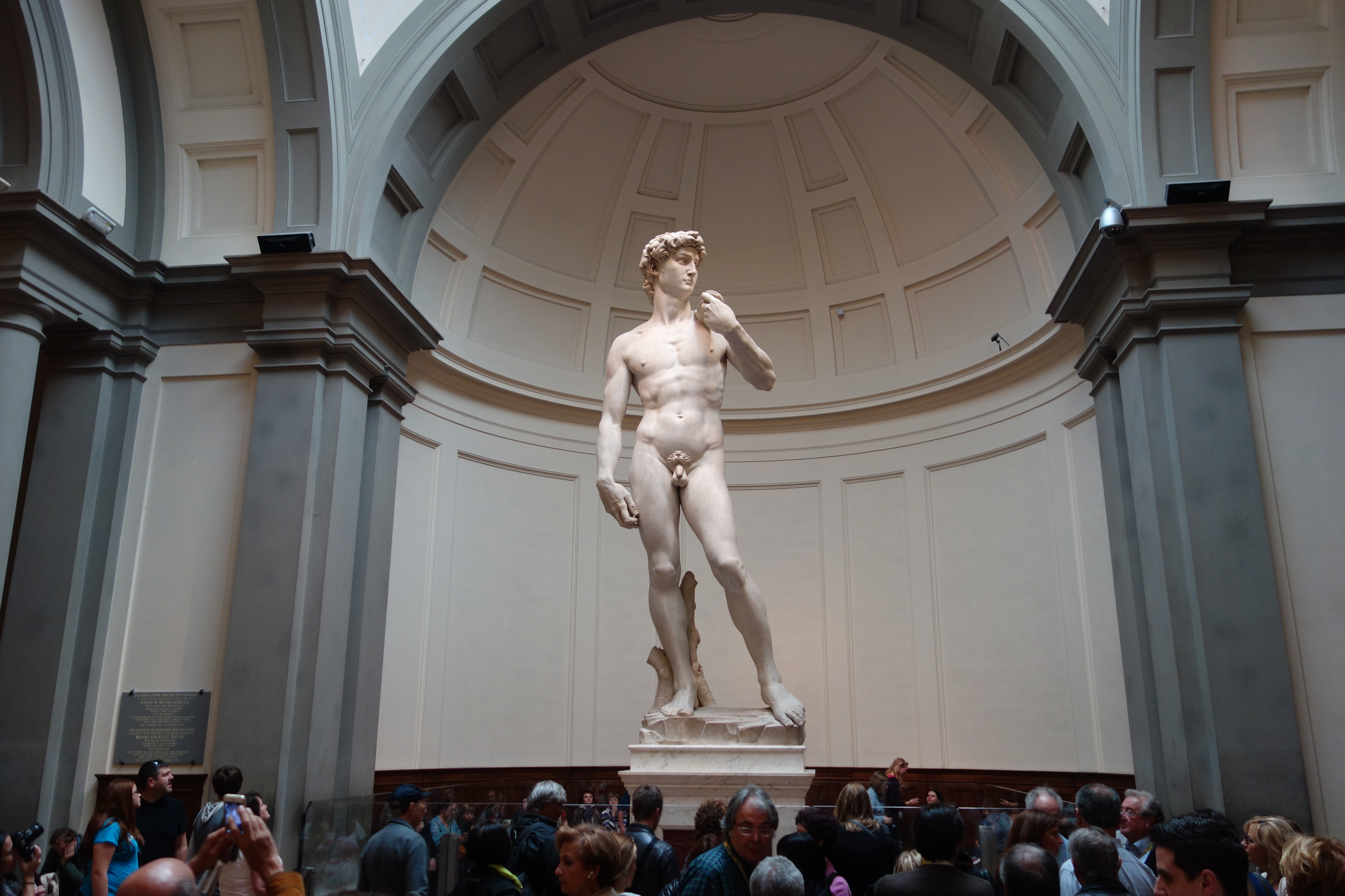 Dünyaca ünlü Michelangelo'nun Davut Heykeli ziyaretçilerine açık.